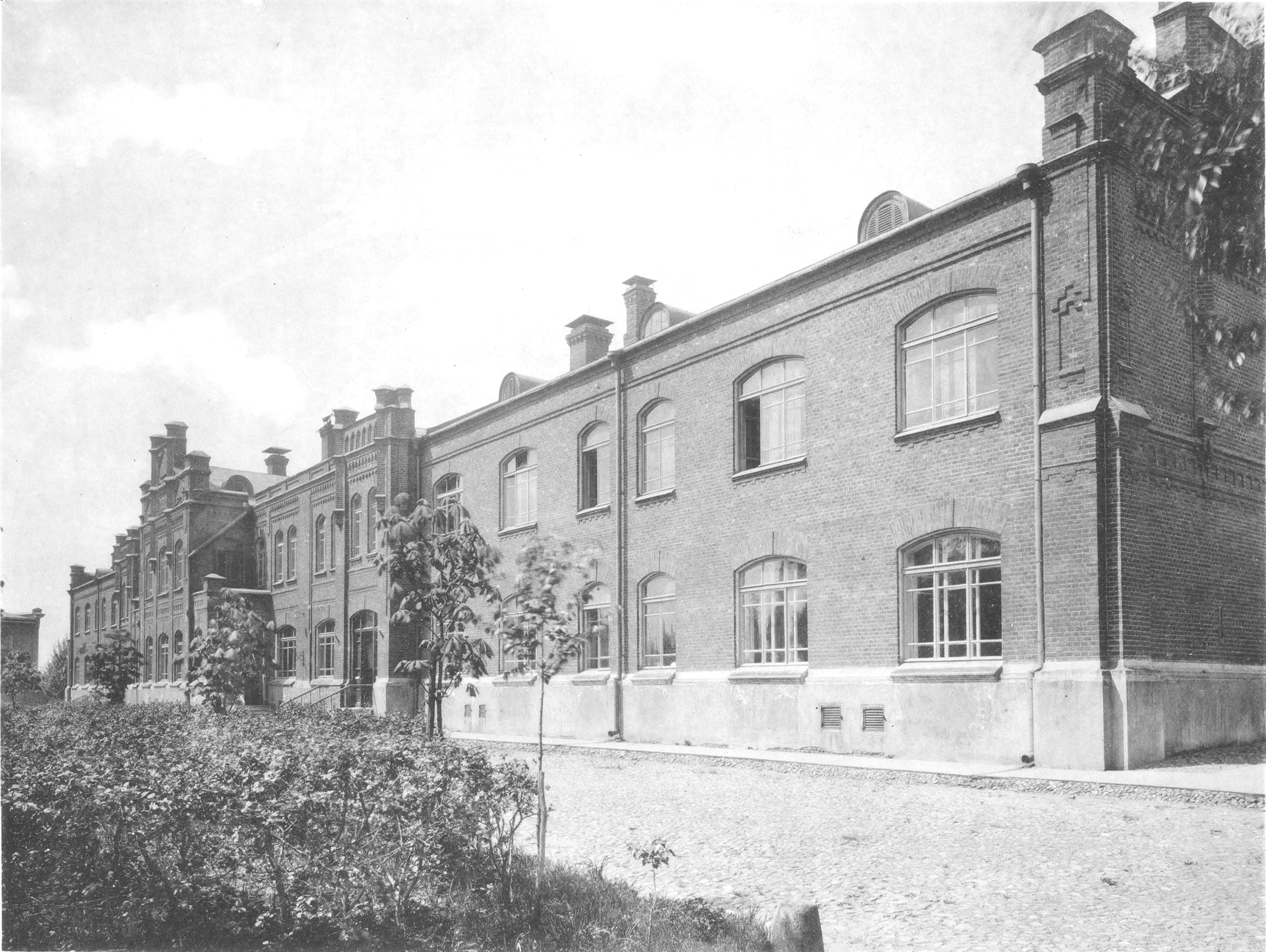 79. ДЪтская больница Св. Владимира. Корпусъ имени кн. А. А. Щербатова. (Москва, Сокольники)